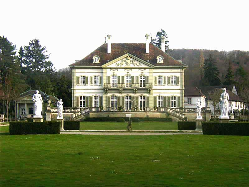 Riehen neuer Wenken Ansicht Gartenseite